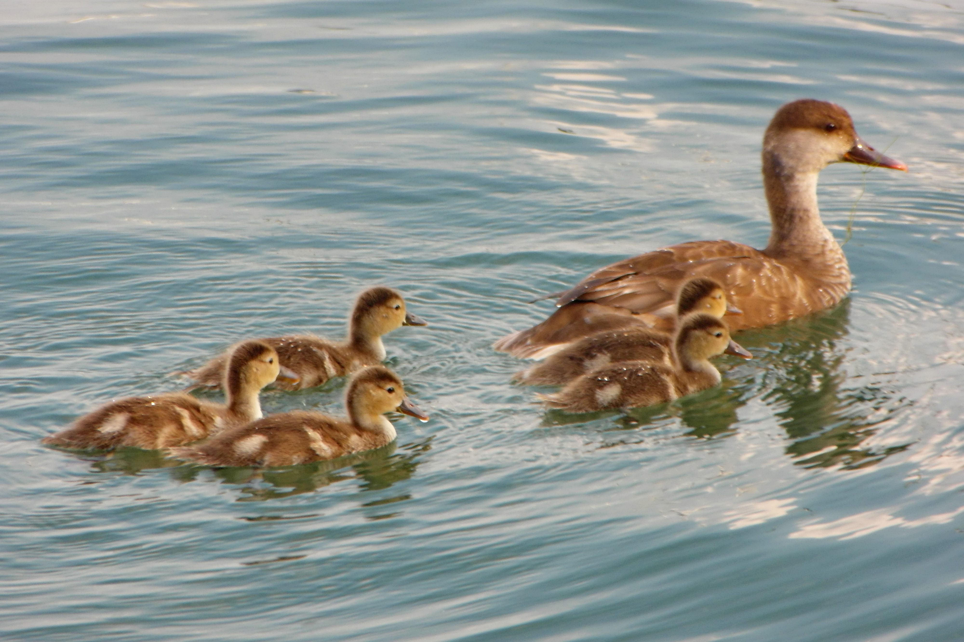 Netta rufina, General-Guisan-Quai in Zürich-Enge (Switzerland)